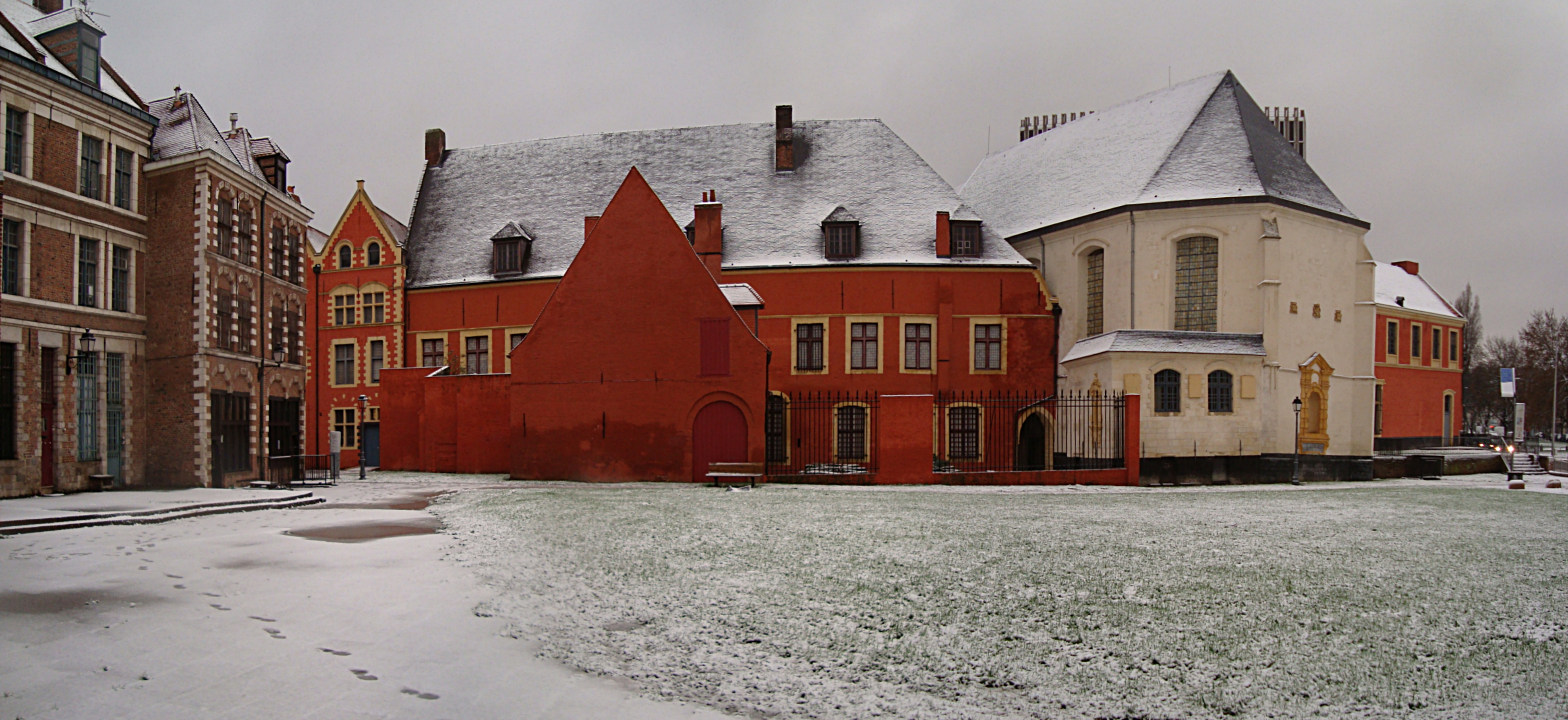 Vue arrière de l'Hospice Comtesse à Lille (Nord), sur le musée et la chapelle.